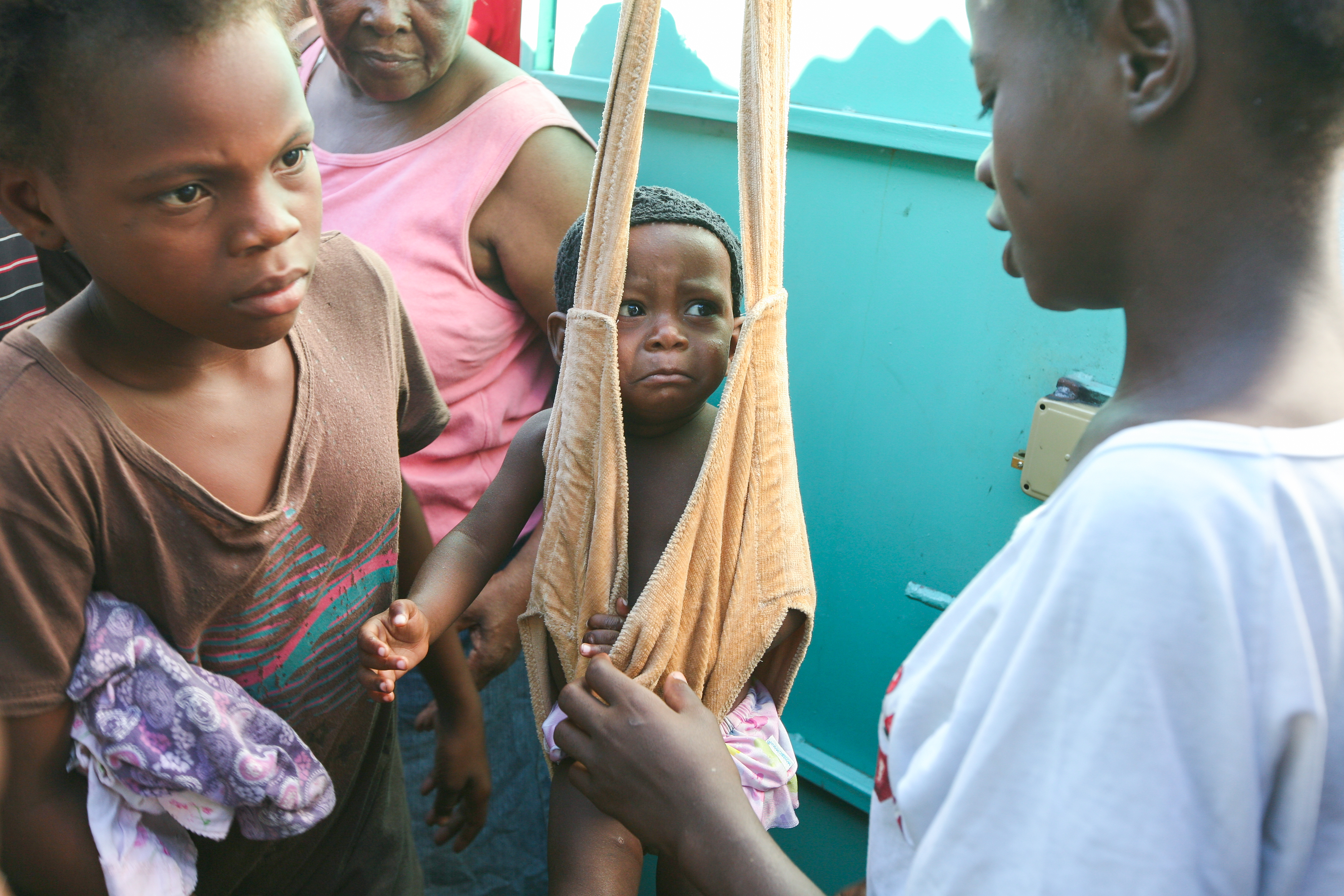 One Upset Little Guy.